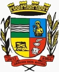 Brasão do Município de Arroio dos Ratos